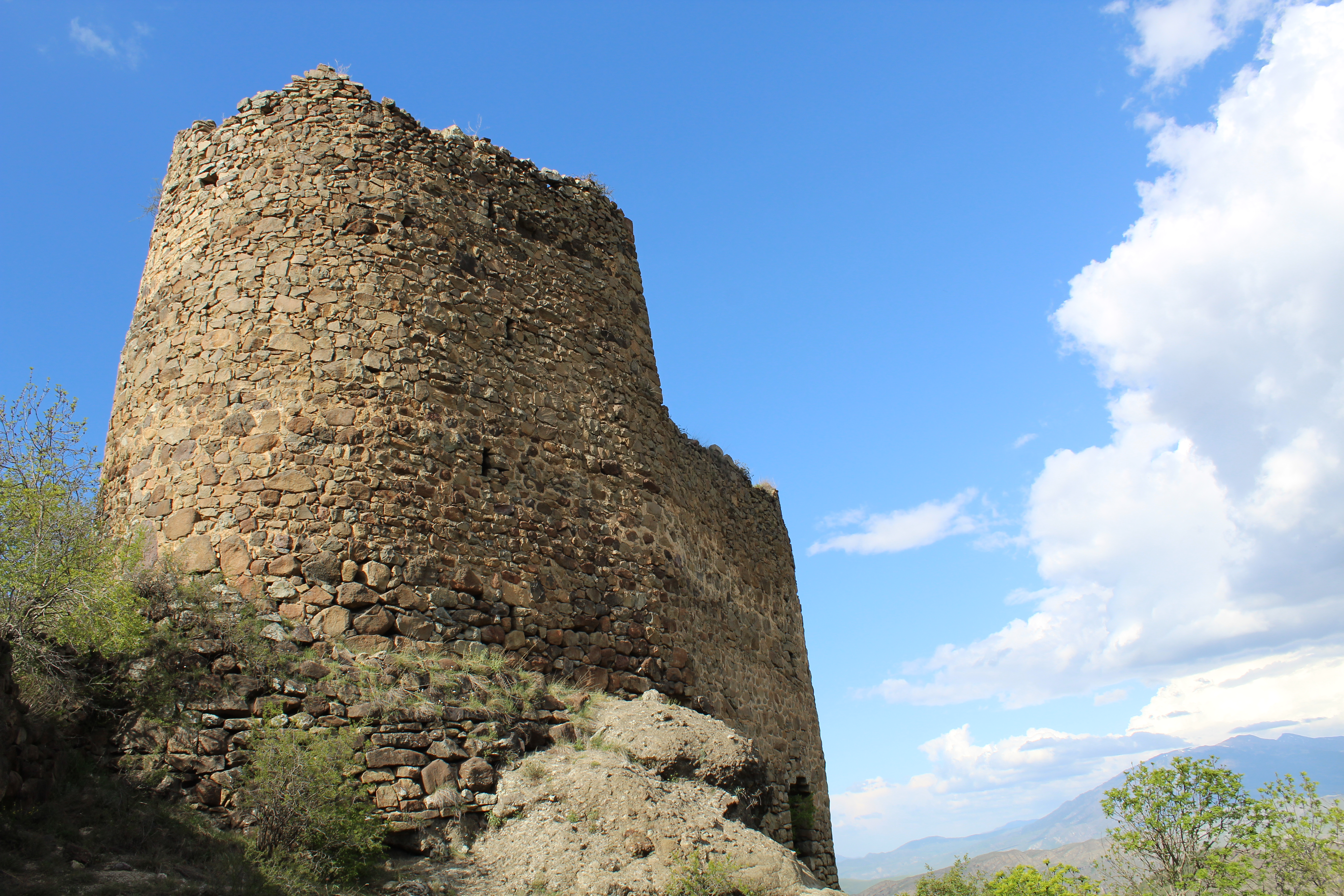 საფარის მონასტერი - წმ. საბას ეკლესია